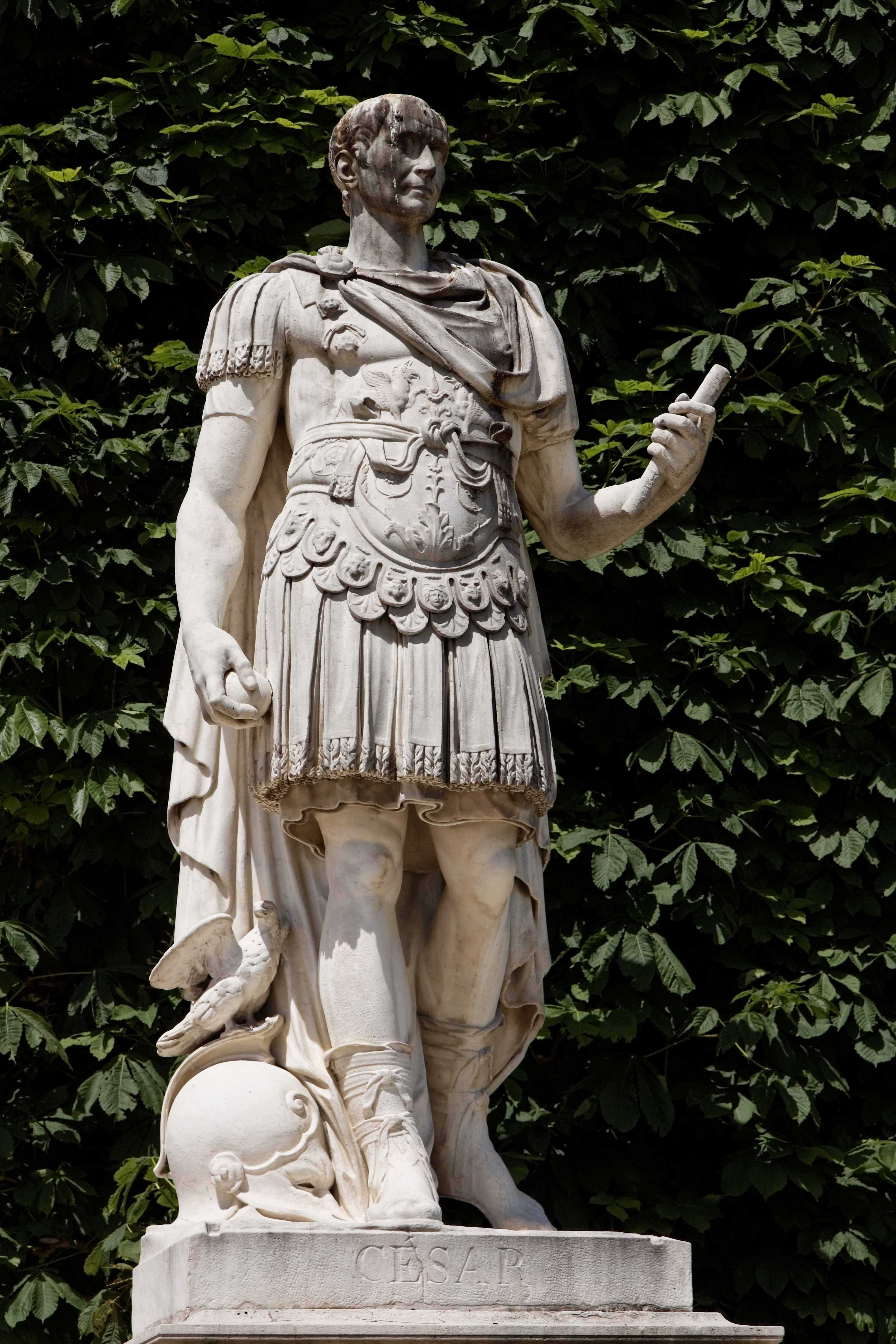 Une statue dans le jardin des Tuileries à Paris. Ambrogio Parisi - Jules César.